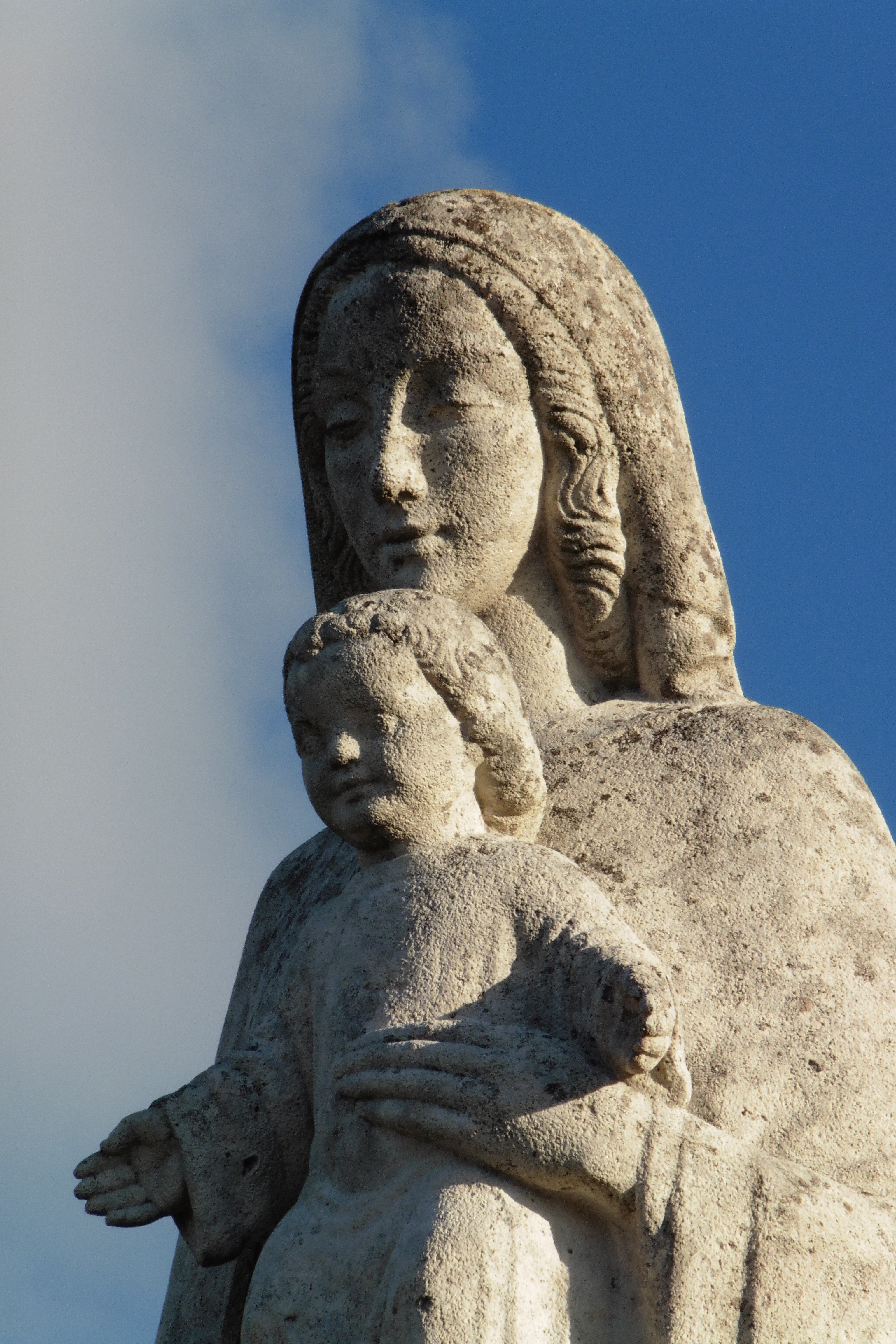 Statue